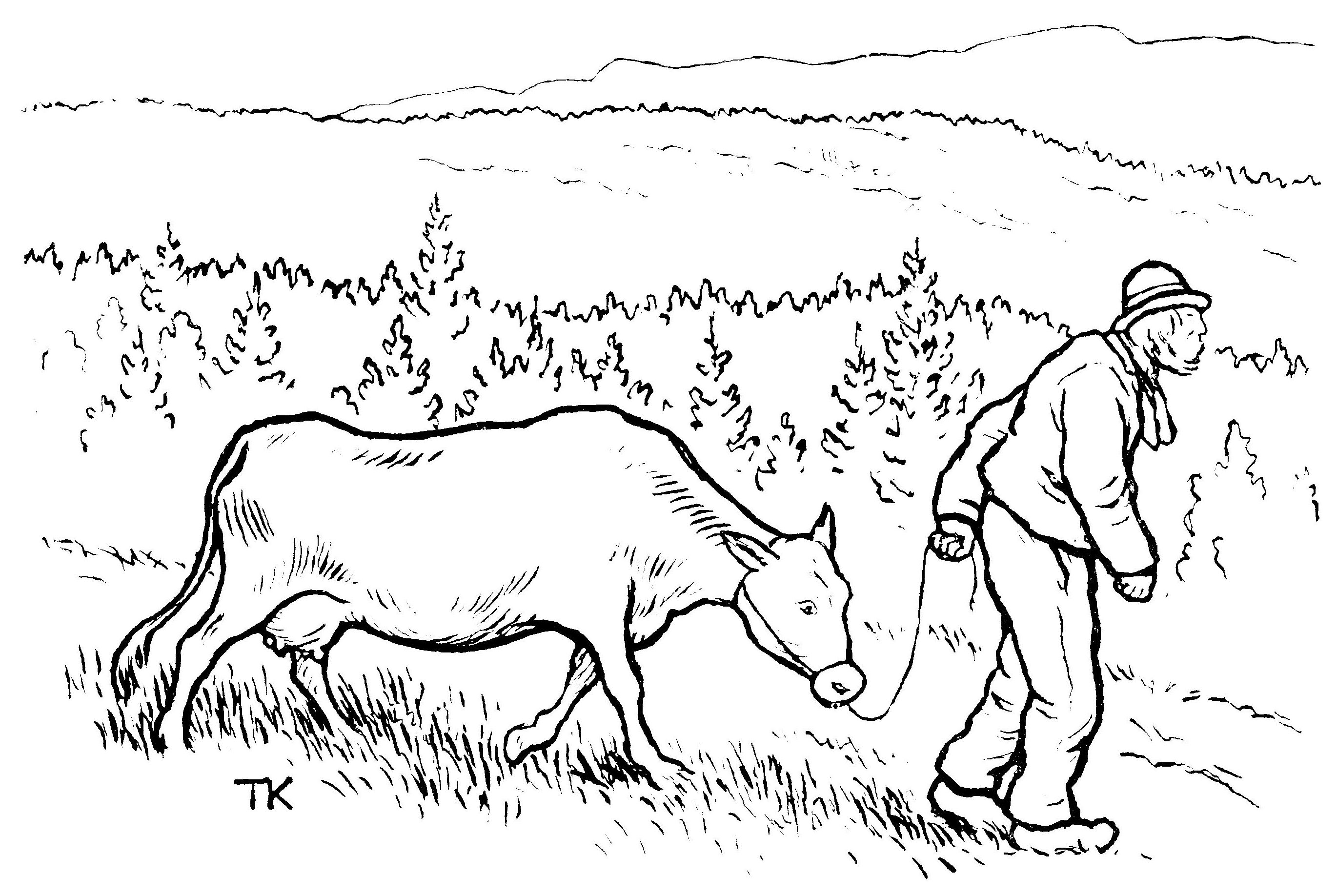 Illustrasjon til folkeeventyret Gudbrand i Lia «Det var en gang en mann som hette Gudbrand; han hadde en gård som lå langt borti en åsli, og derfor kalte de ham Gudbrand i Lia» Scanned illustration from 1936 edition of Asbjørnsen & Moe: Samlede eventyr. Norske kunstneres billedutgave. Gyldendal Norsk forlag.